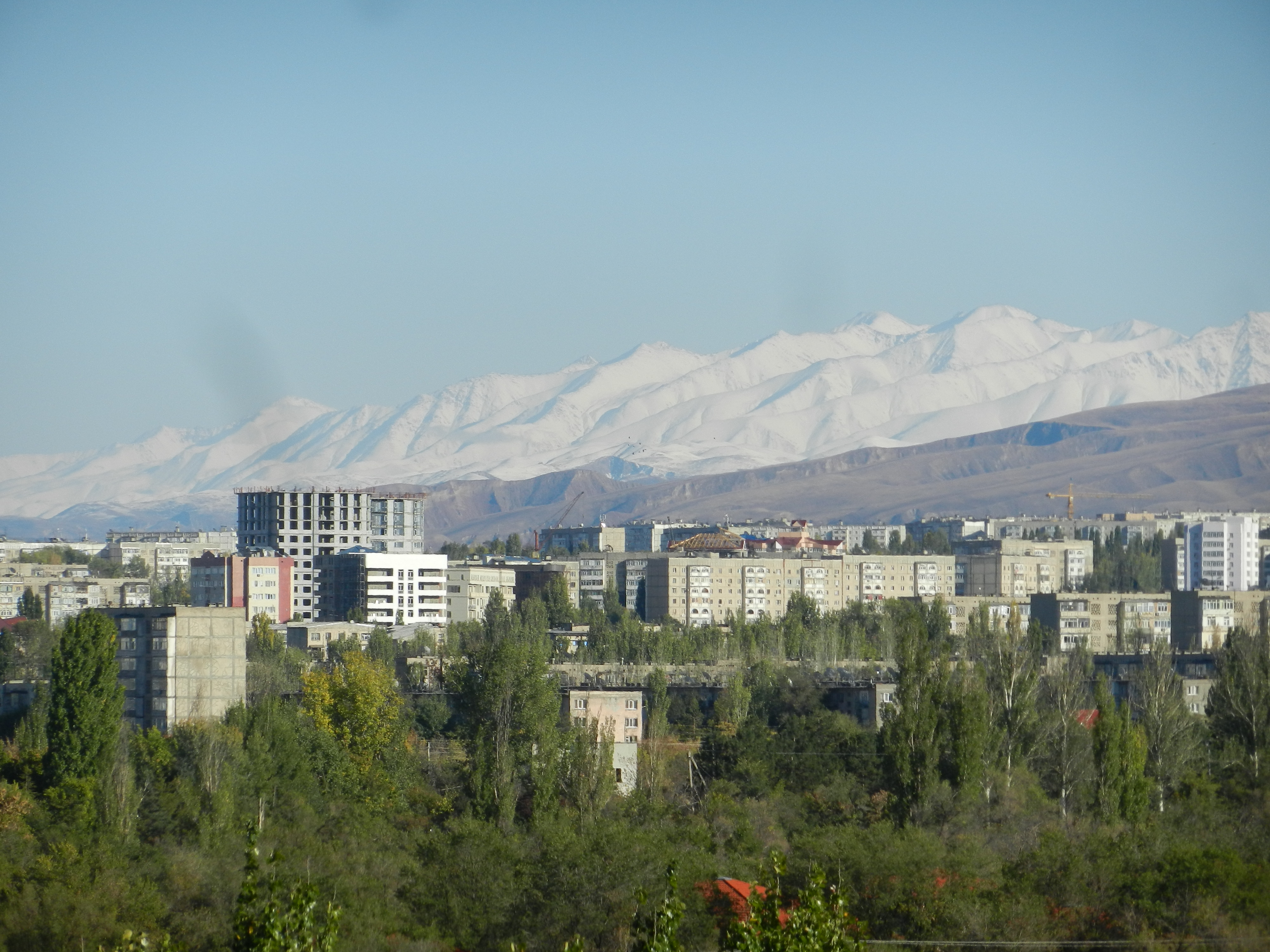 Biškek z gorami v ozadju